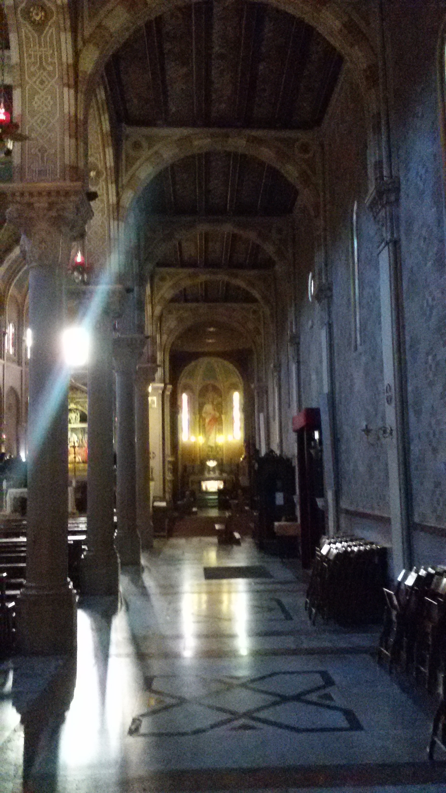 Chiesa di Santa Cristina Quinto di Treviso